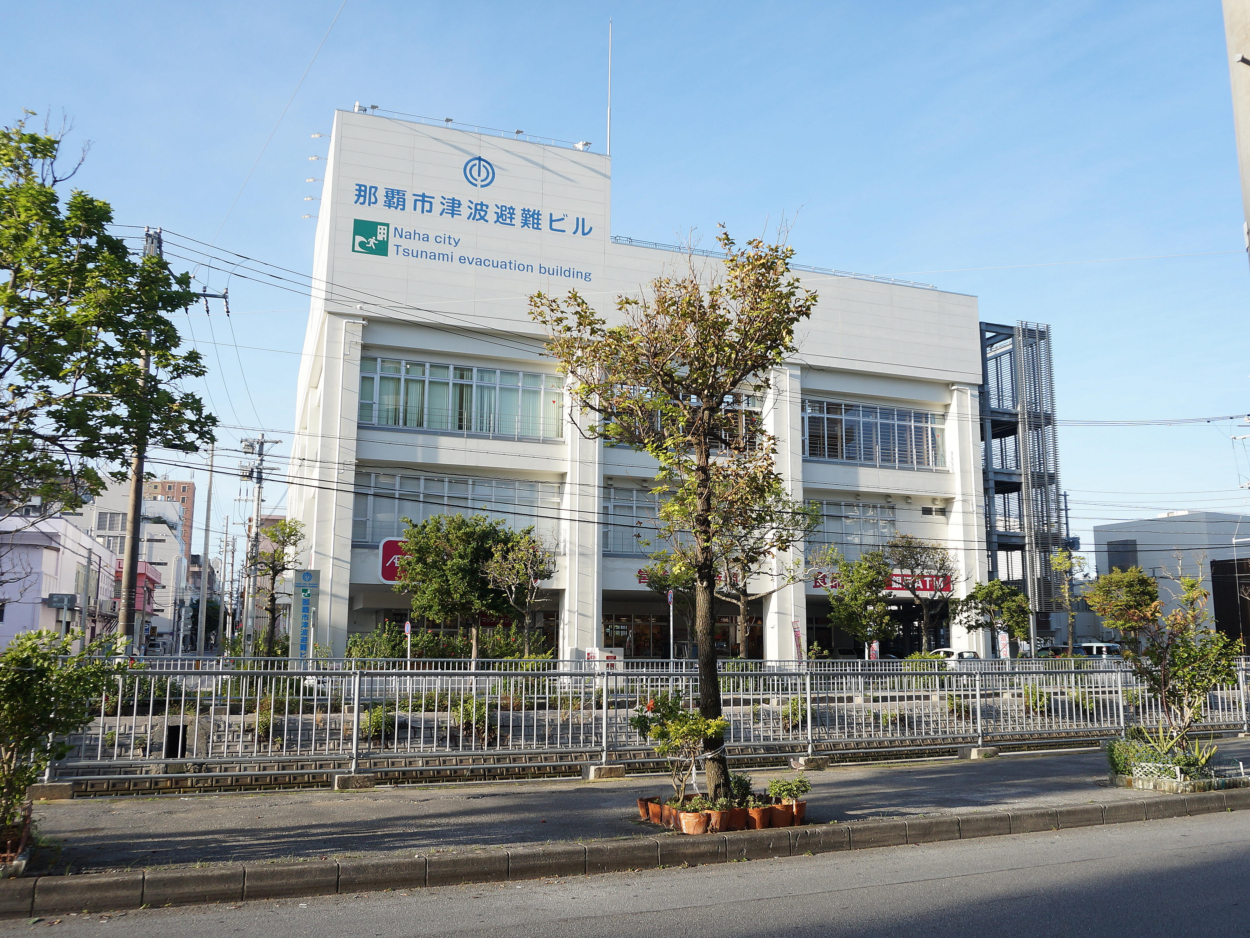 沖繩縣那霸市松山2丁目，那霸市海嘯避難大樓，一樓設置永旺琉球MaxValu松山店。